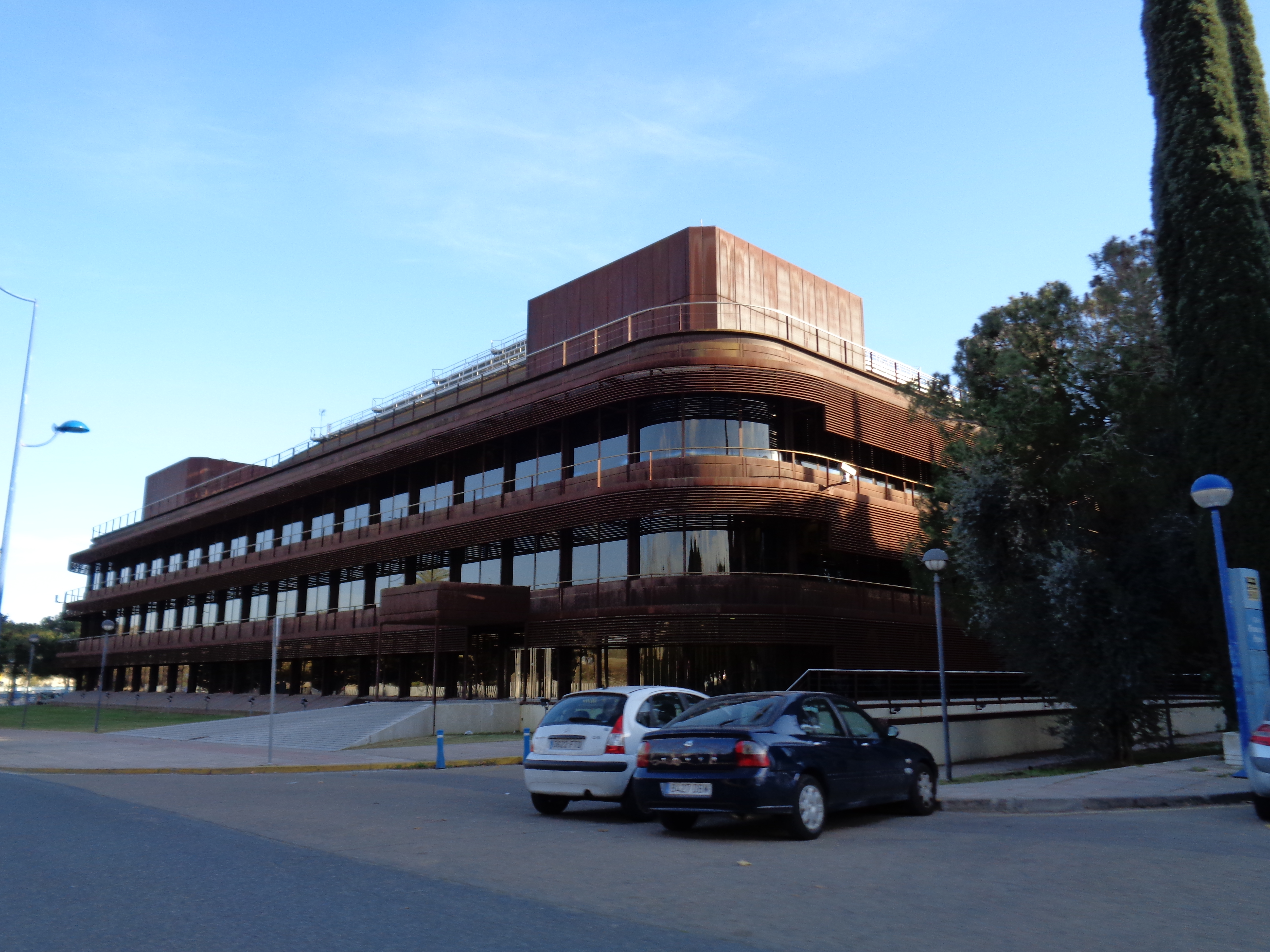 Edificio World Trade Center de Sevilla, también llamado Edificio Expo. Fue construído para la Exposición Universal de 1992